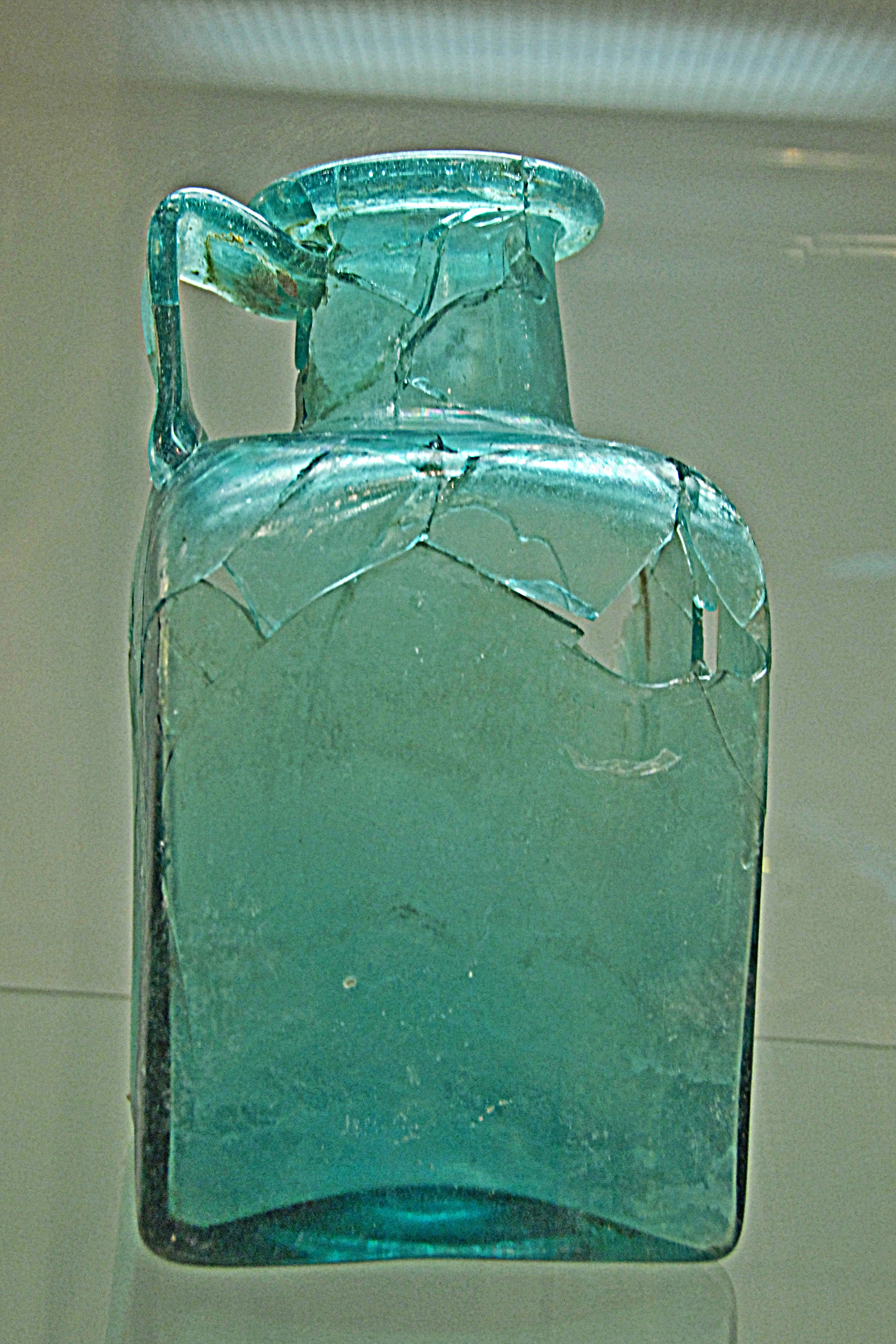 Civaux, Museum, gallorömische Glasurne